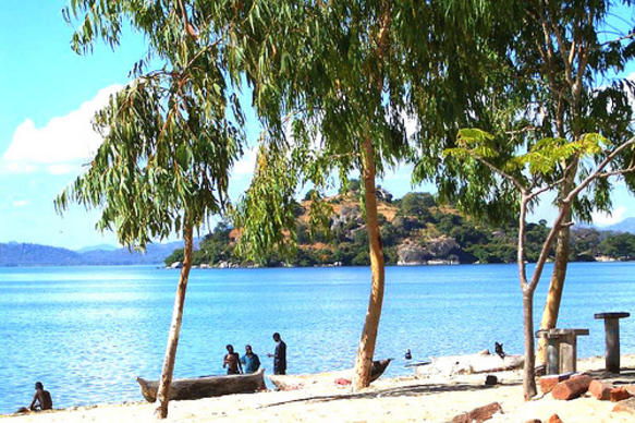 Lake Malawi, Mangochi